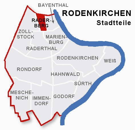 Lage des Stadtteils Raderberg im Stadtbezik Rodenkirchen